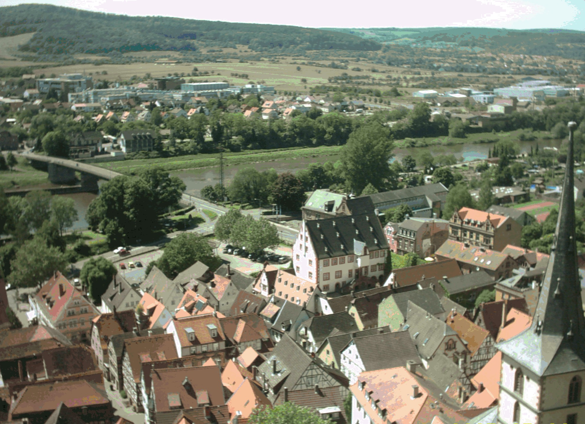 Blick auf Klingenberg am Main Fotograf: presse03, selbst fotografiert 2005 Lizenz: GNU-FDL